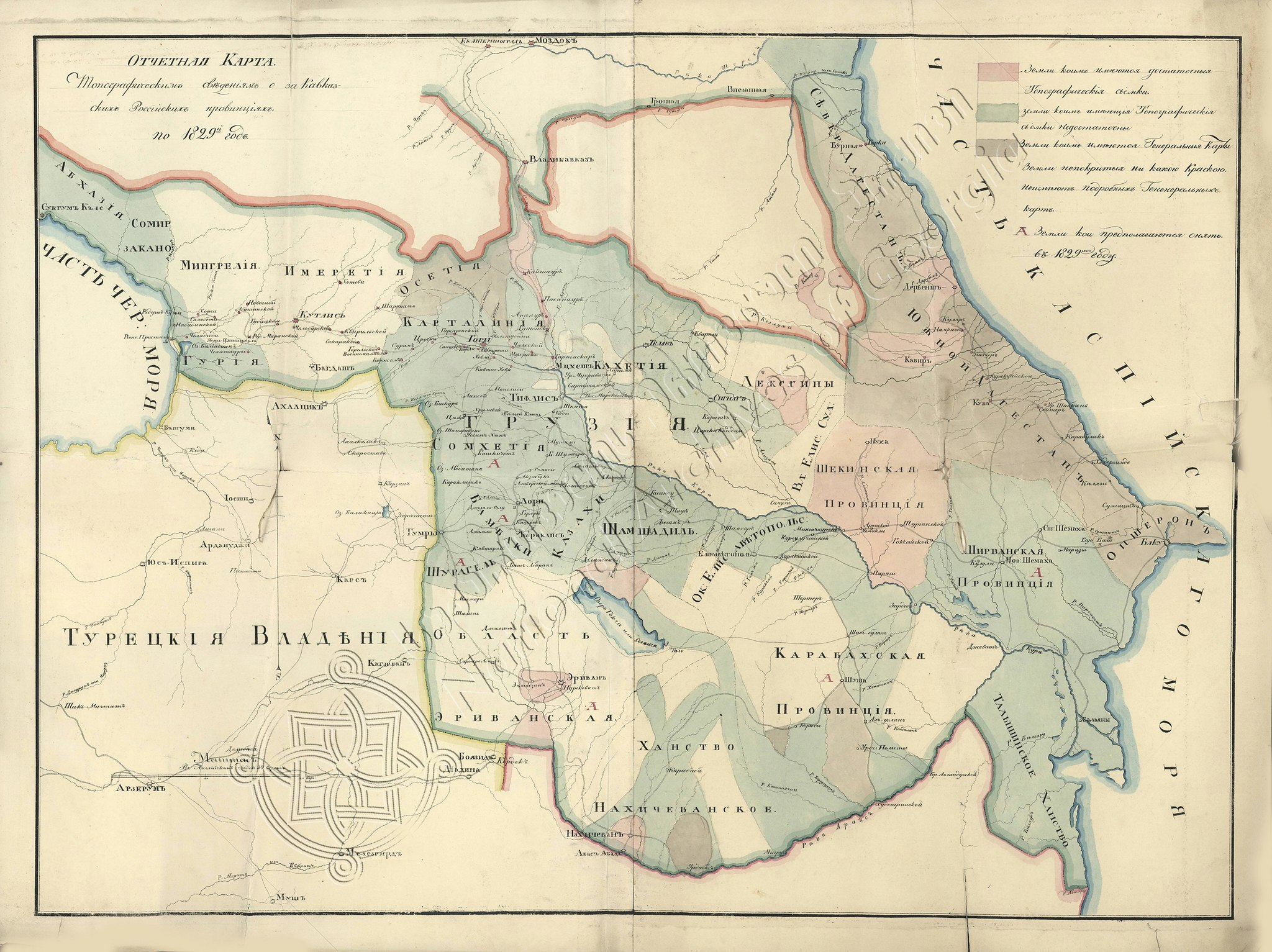 Карта топографических сведений о Закавказских Российских провинциях 1829г